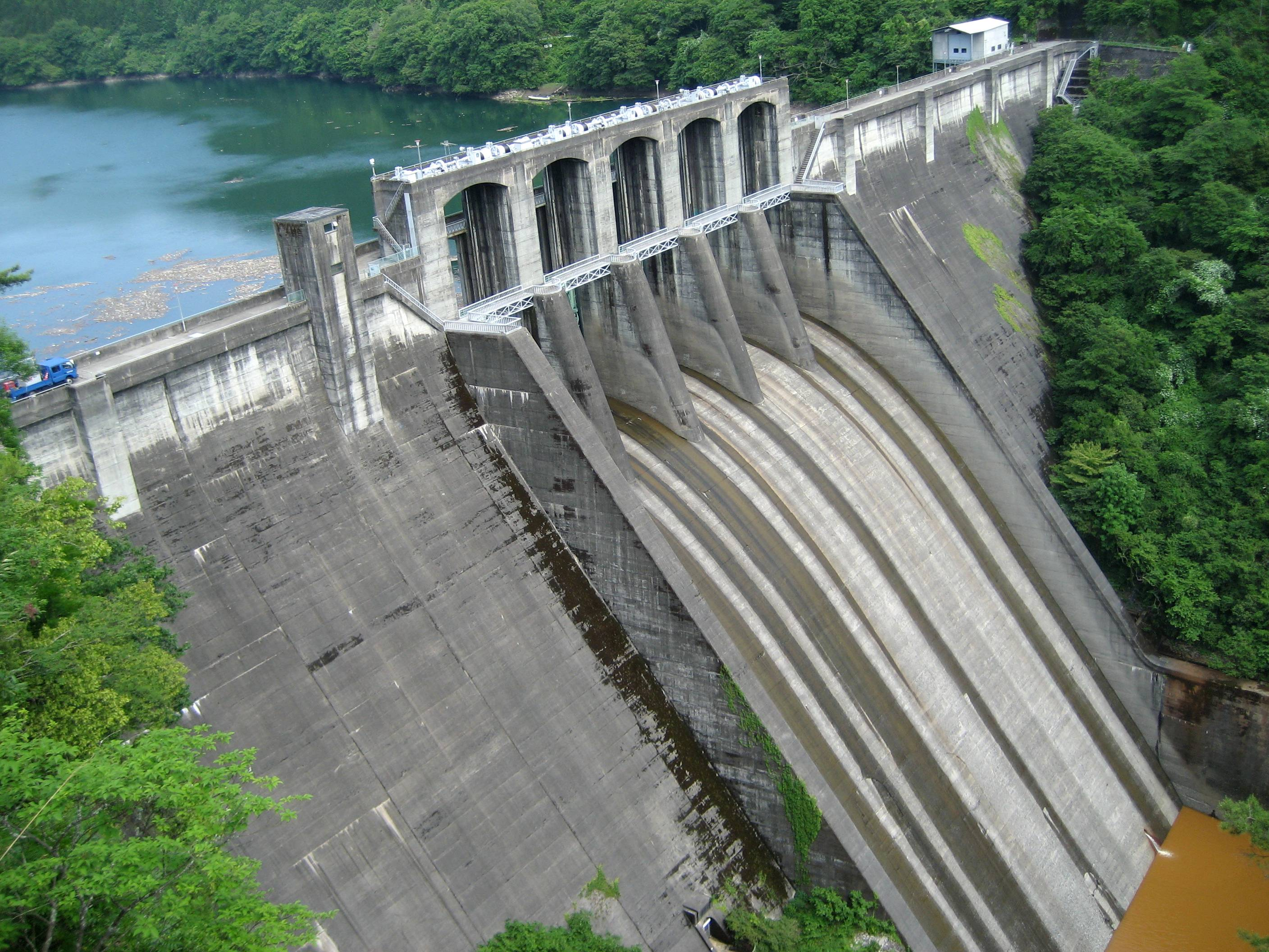 Maruyama Dam (丸山ダム)